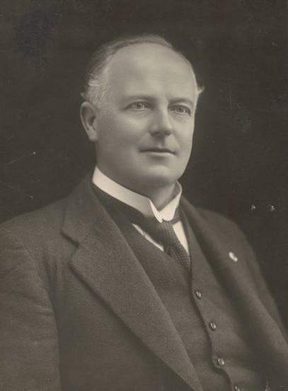 Eric Bowden